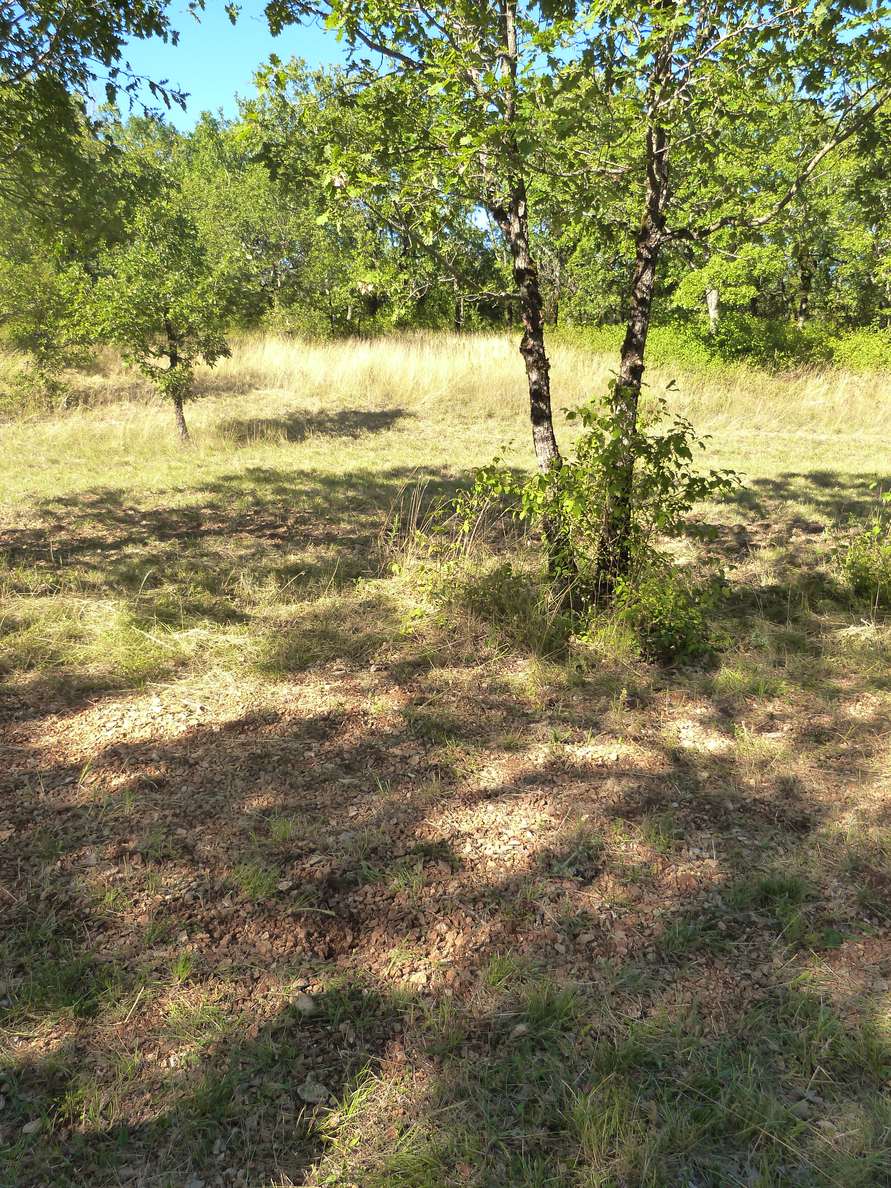 Truffière de Lalbenque : un brûlé.